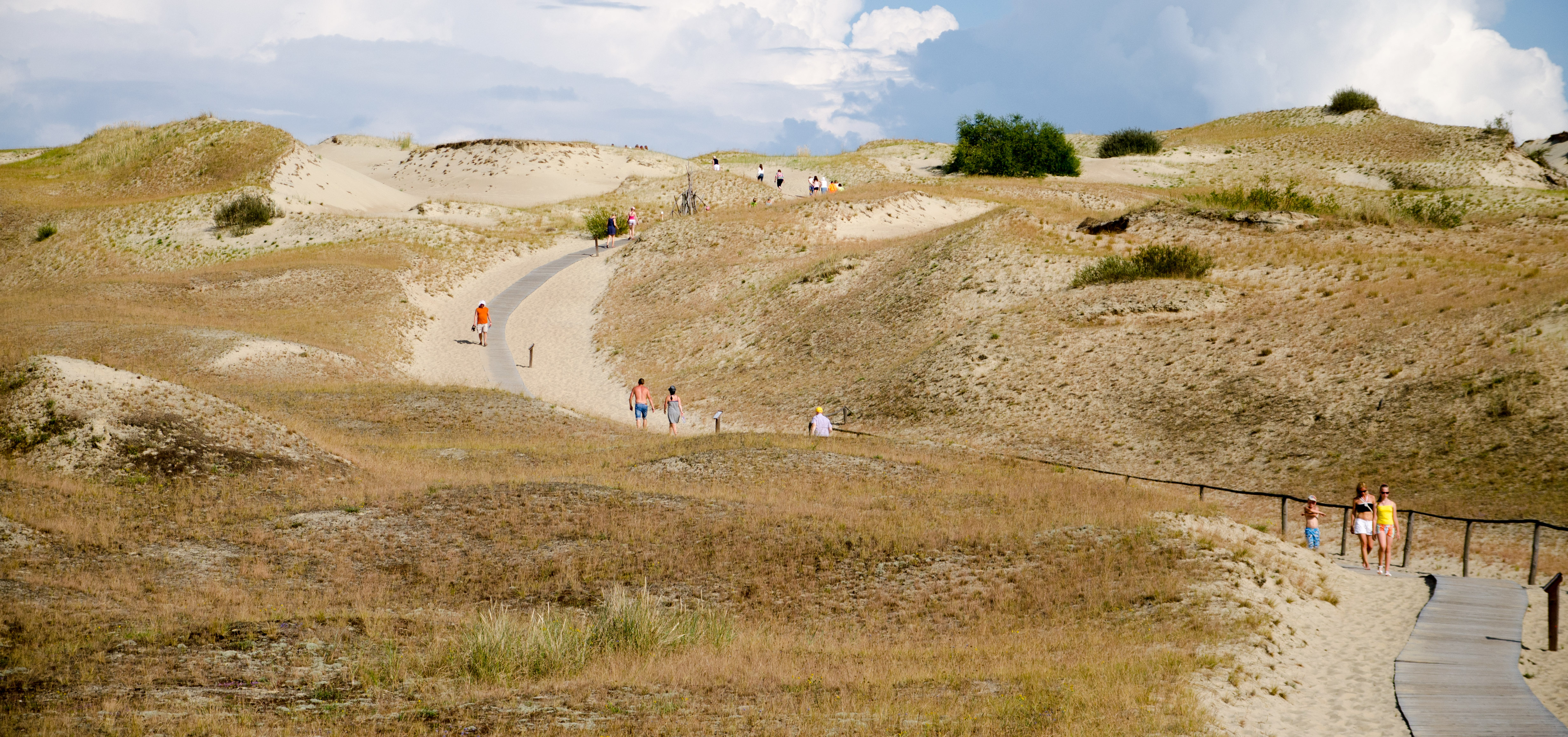 Nida